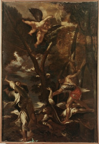 Martirio di san pietro martire da tiziano, copia cinquecentesca in collezione privata a Palermo